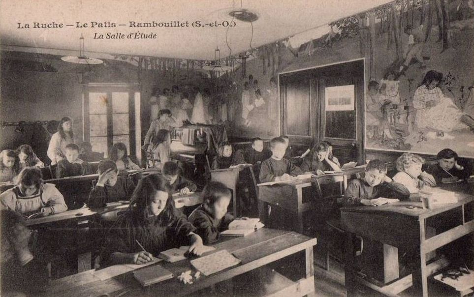 carte postale éditée par l'imprimerie de la Ruche de Rambouillet : les enfants sont dans la salle de classe unique de l'école